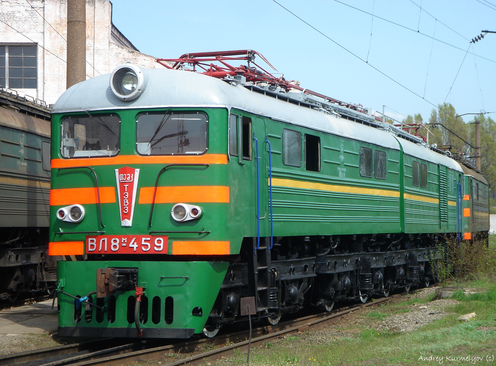 Построен ТЭВЗ. В 1965 г. получил индекс ВЛ8-459. С завода поступил в депо Кинель. В 1970 г. передан в депо Мелитополь. В 1988 г. передан в депо Симферополь. С 1997 г. по 2000 г. работал в депо Джанкой. В 2006 г. передан в депо Нижнеднепровск-Узел. КР Львовский ЛРЗ 04.2008 г.